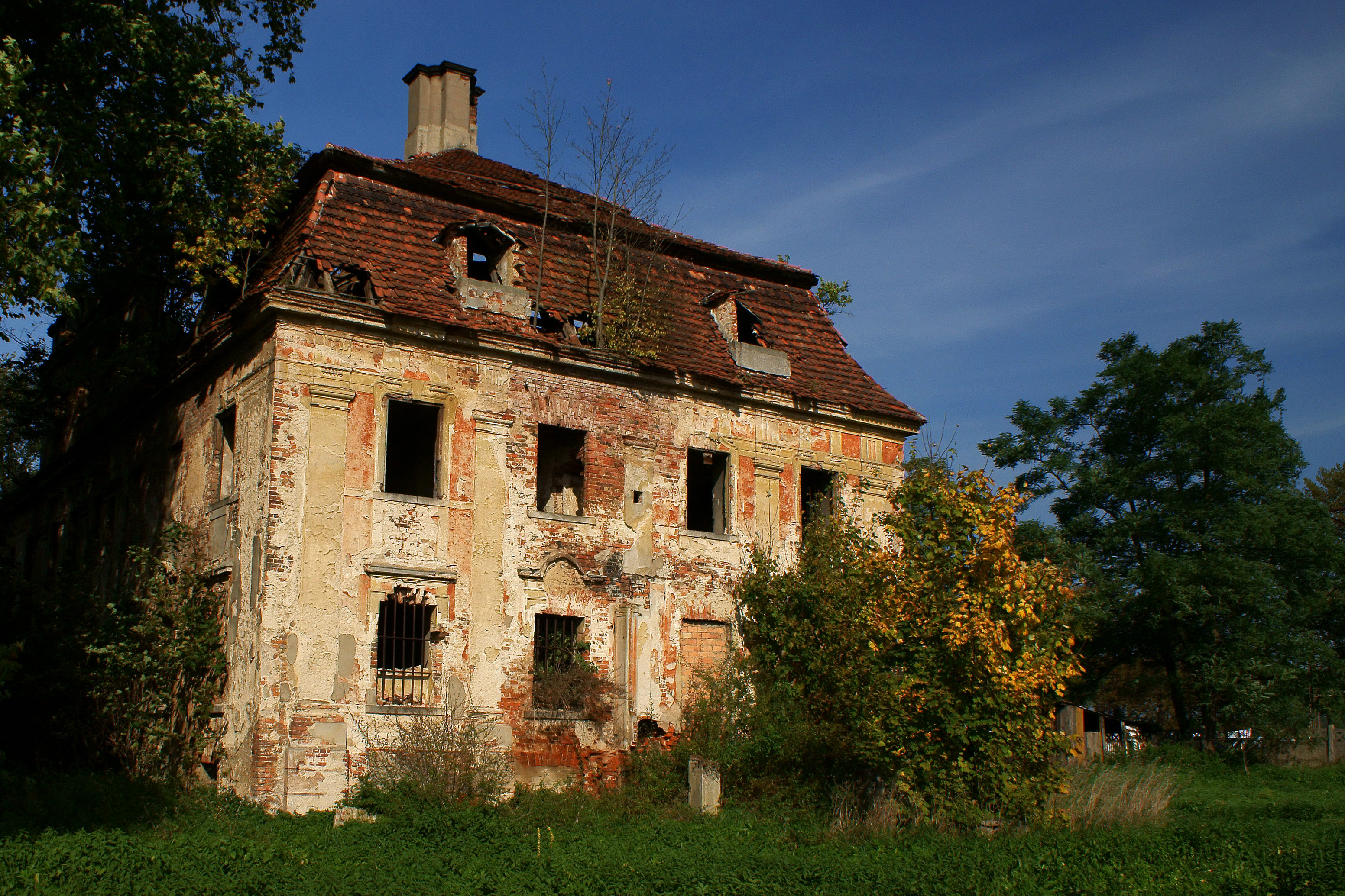 Parchów - pałac w ruinie (zabytek nr A/3221/956 z dn. 4.10.1961)